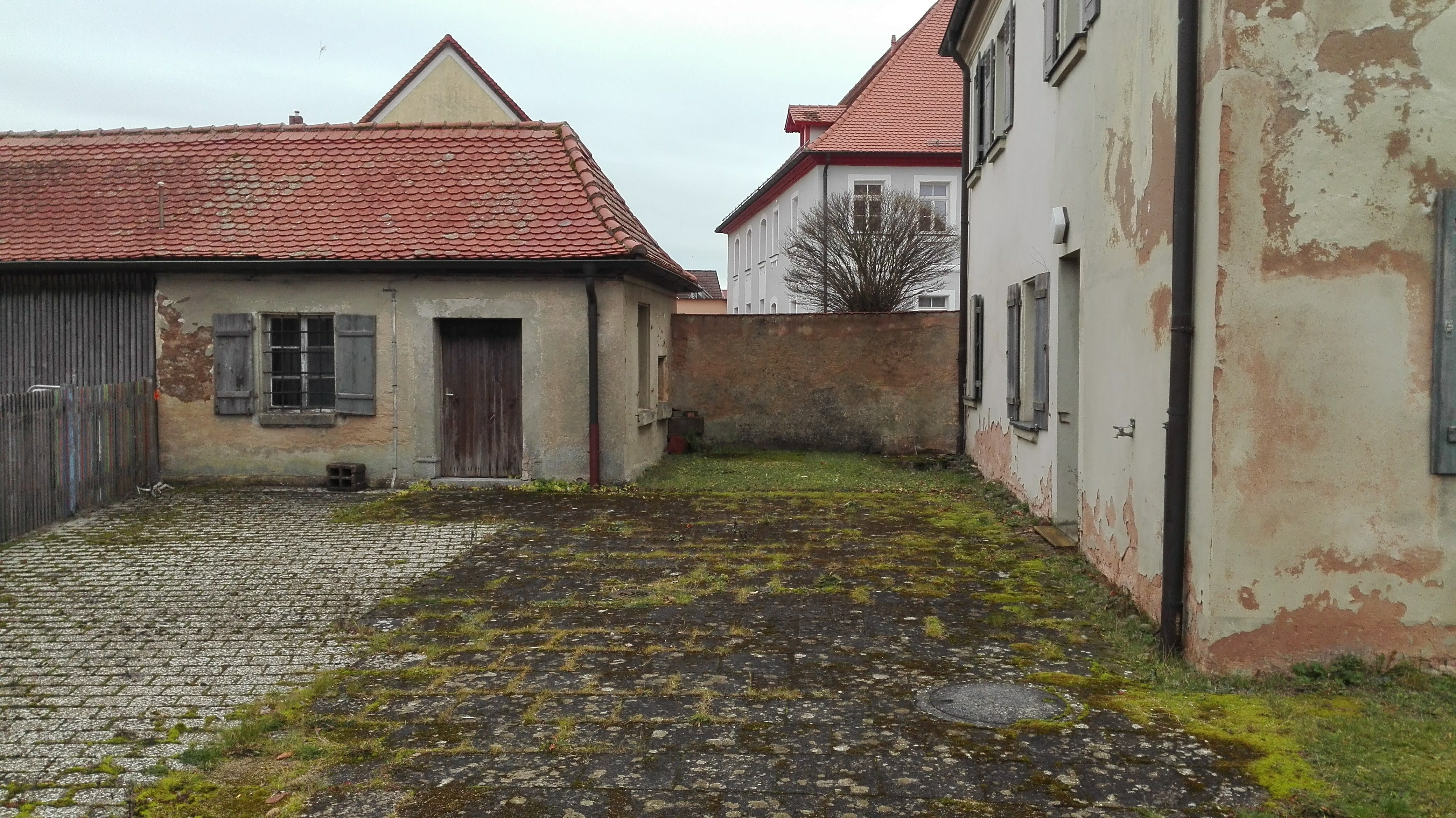 Backhaus des Pfarrhof Cronheim